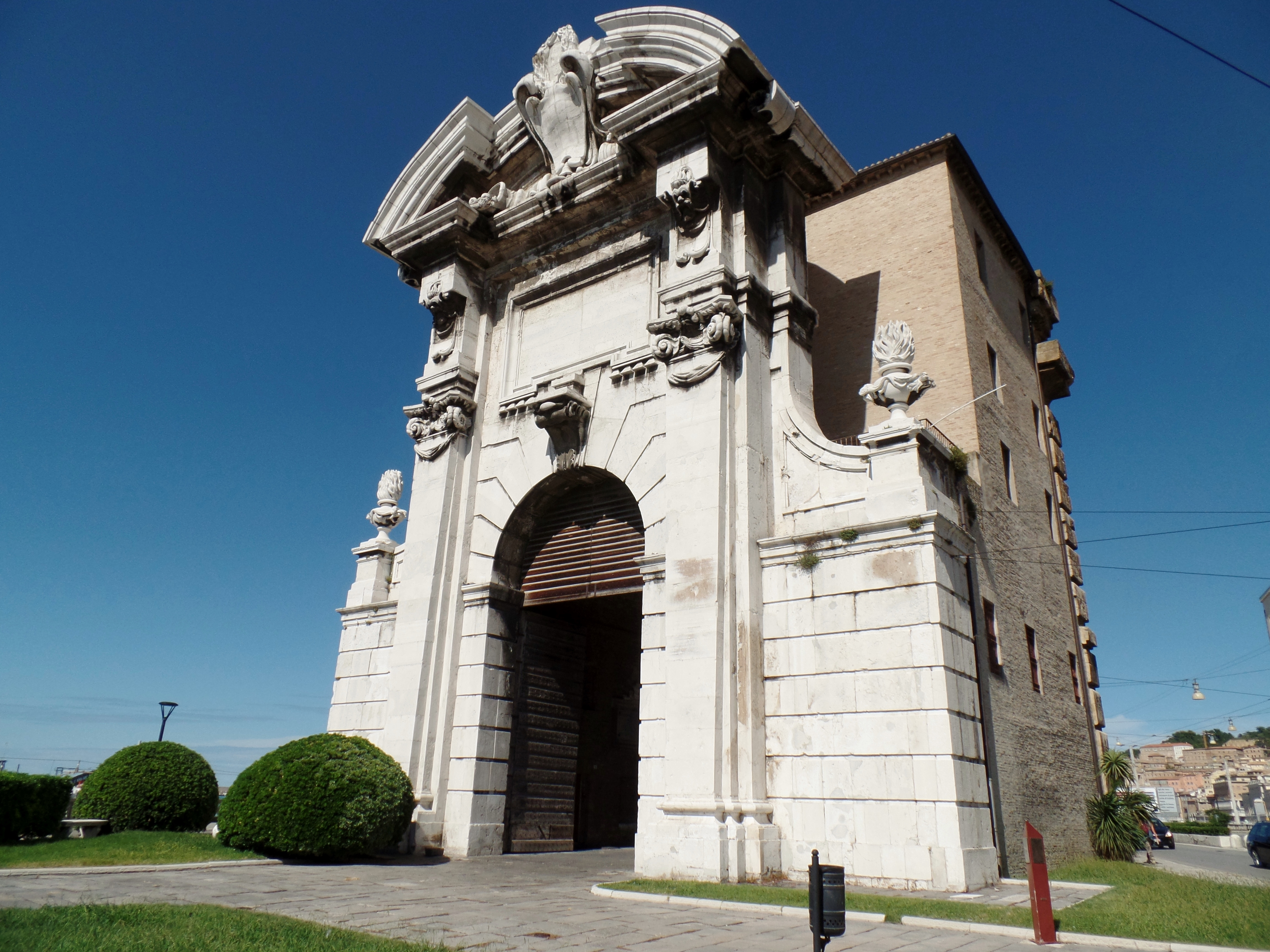 Porta Pia This is a photo of a monument which is part of cultural heritage of Italy.